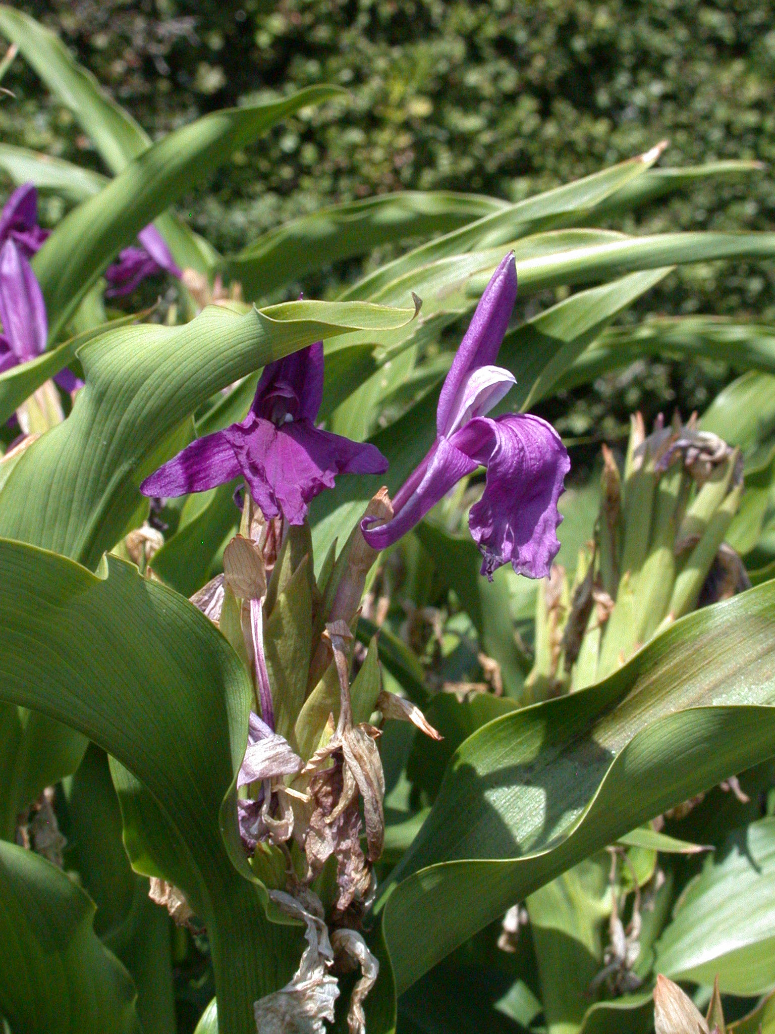 Specimen labelled: "Roscoea purpurea. Zingiberaceae. Himalaya." Identified as R. auriculata – see File_talk:Roscoea_purpurea_20070810-1338-183.jpg.